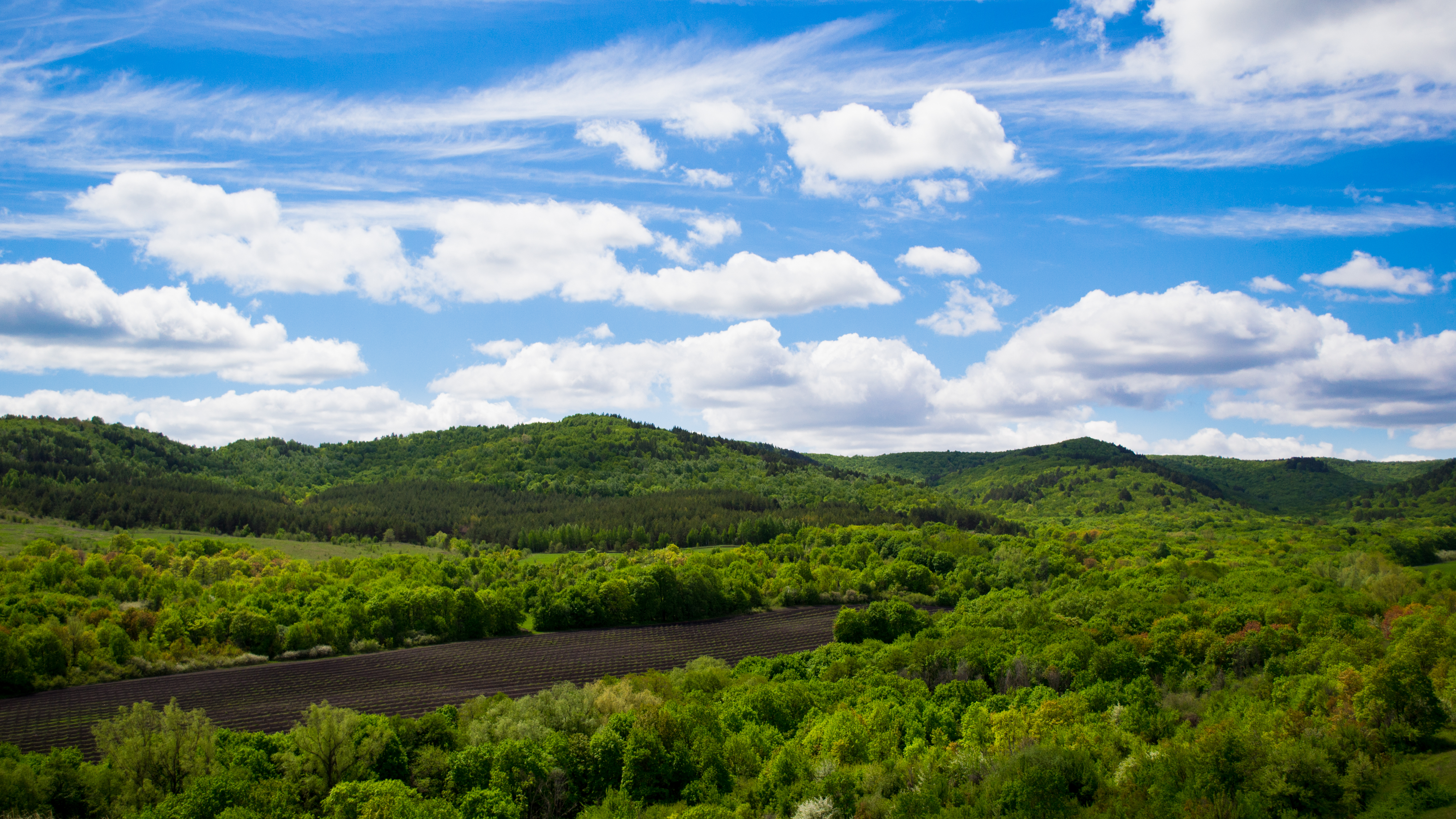 Хвалынский район, Саратовская область This image is related to the protected area of Russia number 6400157